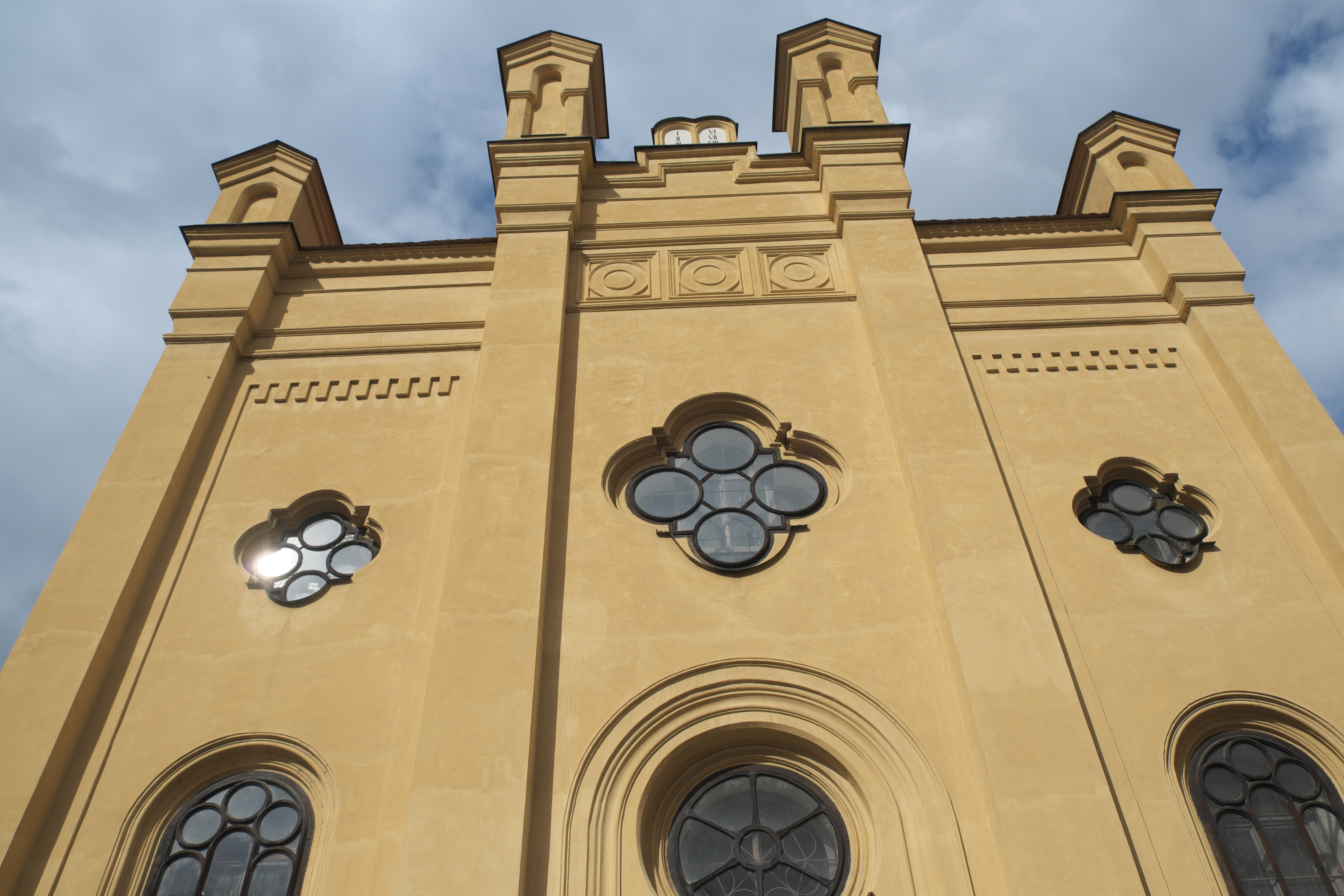 Synagoge in Písek (Südböhmen/Tschechien)